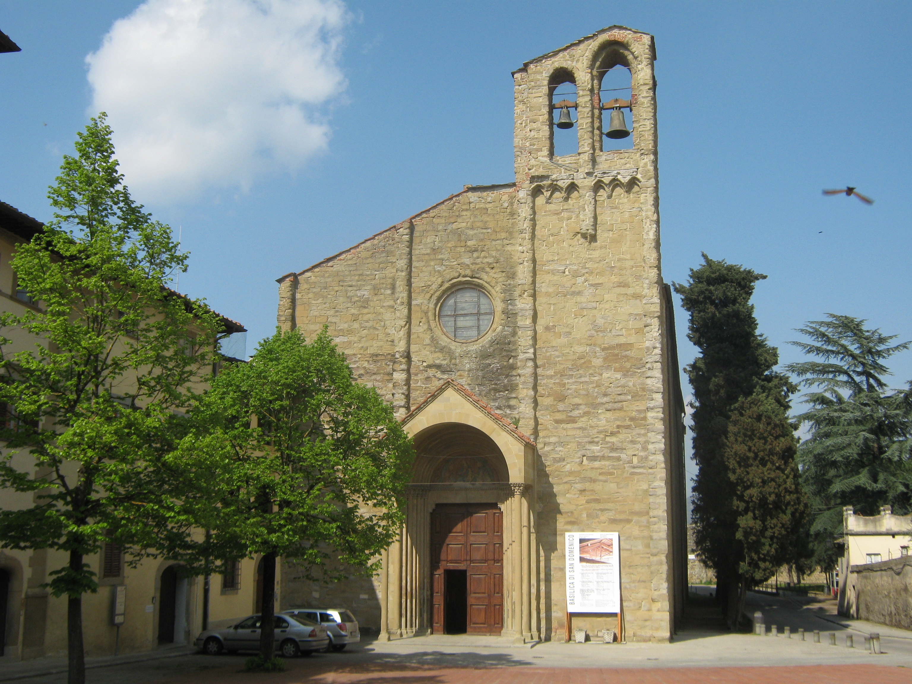 Chiesa di San Domenico, Arezzo